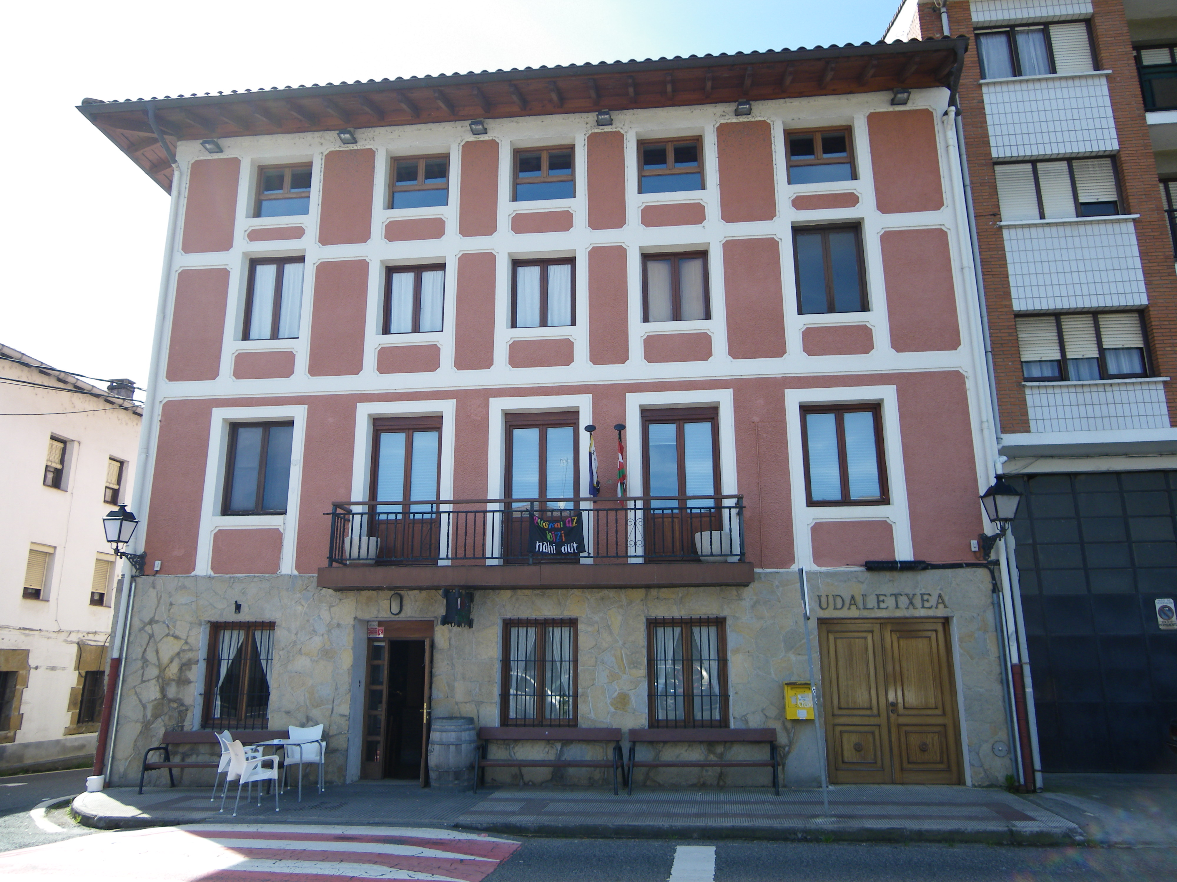 Fruizko udaletxea, Aldai auzoa, Fruiz, Bizkaia, Euskal Herria.